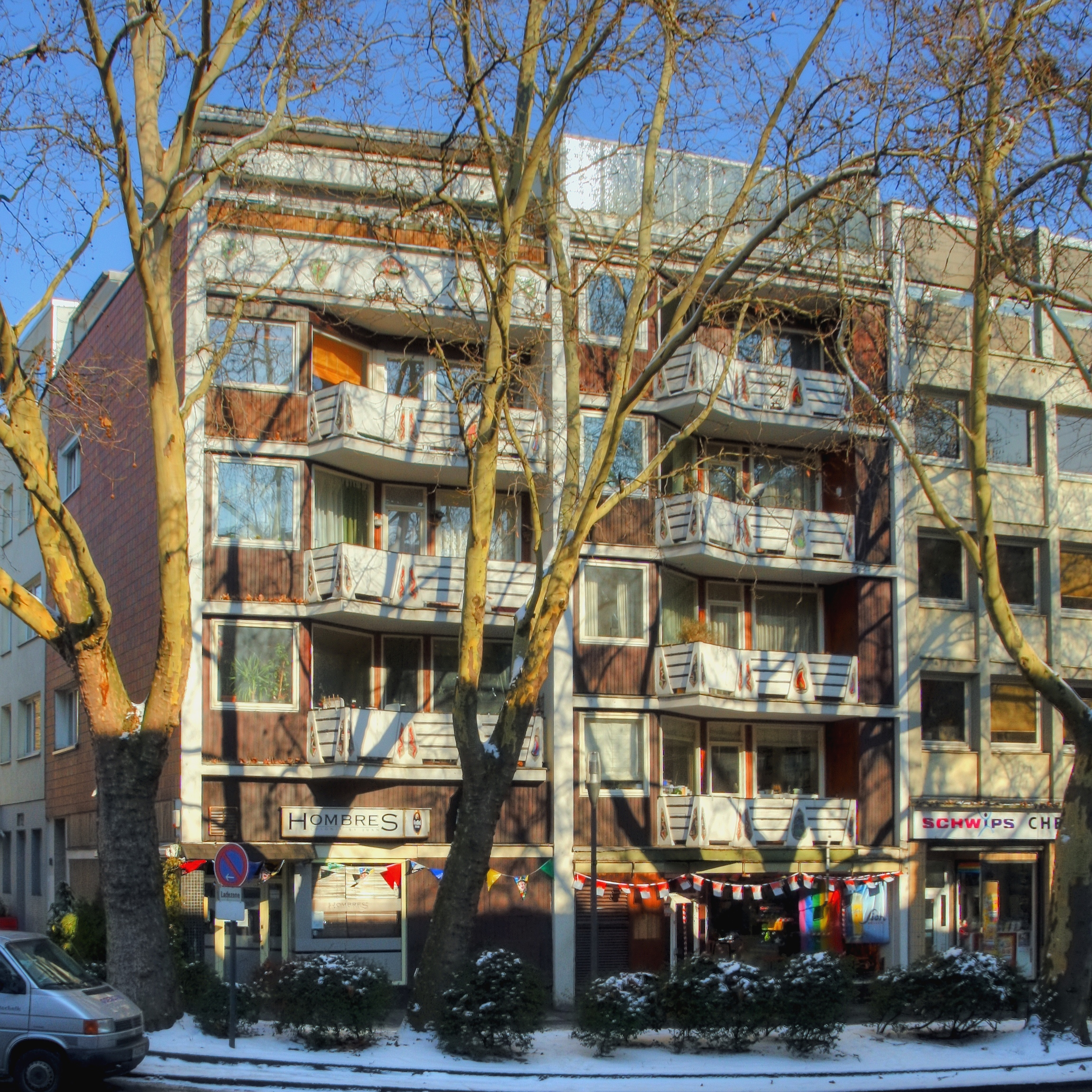 Denkmalgeschütztes Wohn- und Geschäftshaus. Vor St. Martin 12, 50667 Köln. Architekt: Hans Schilling, erbaut um 1955 This is a photograph of an architectural monument.